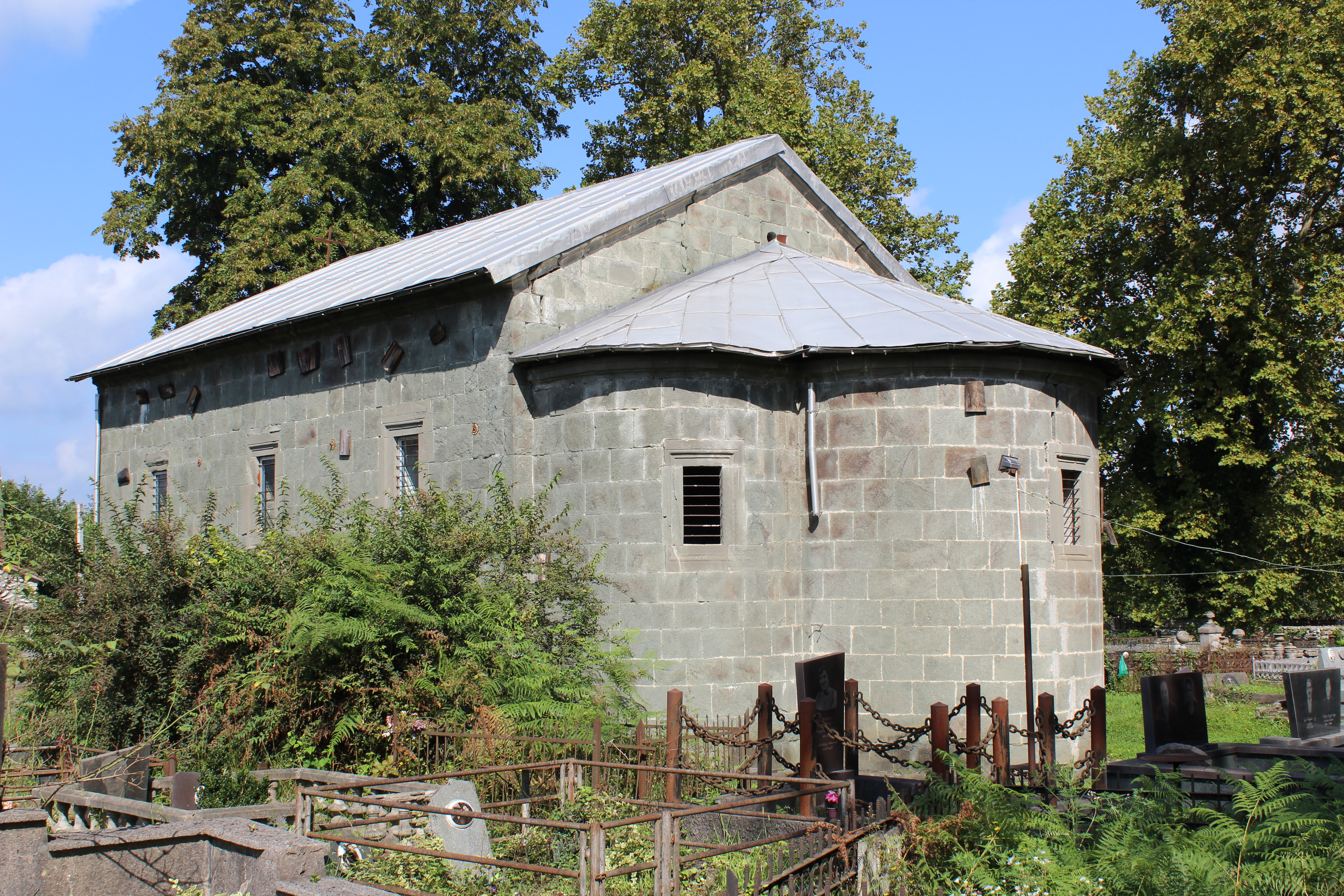 დვაბზუს წმინდა გიორგის სახელობის VI საუკუნის ეკლესია